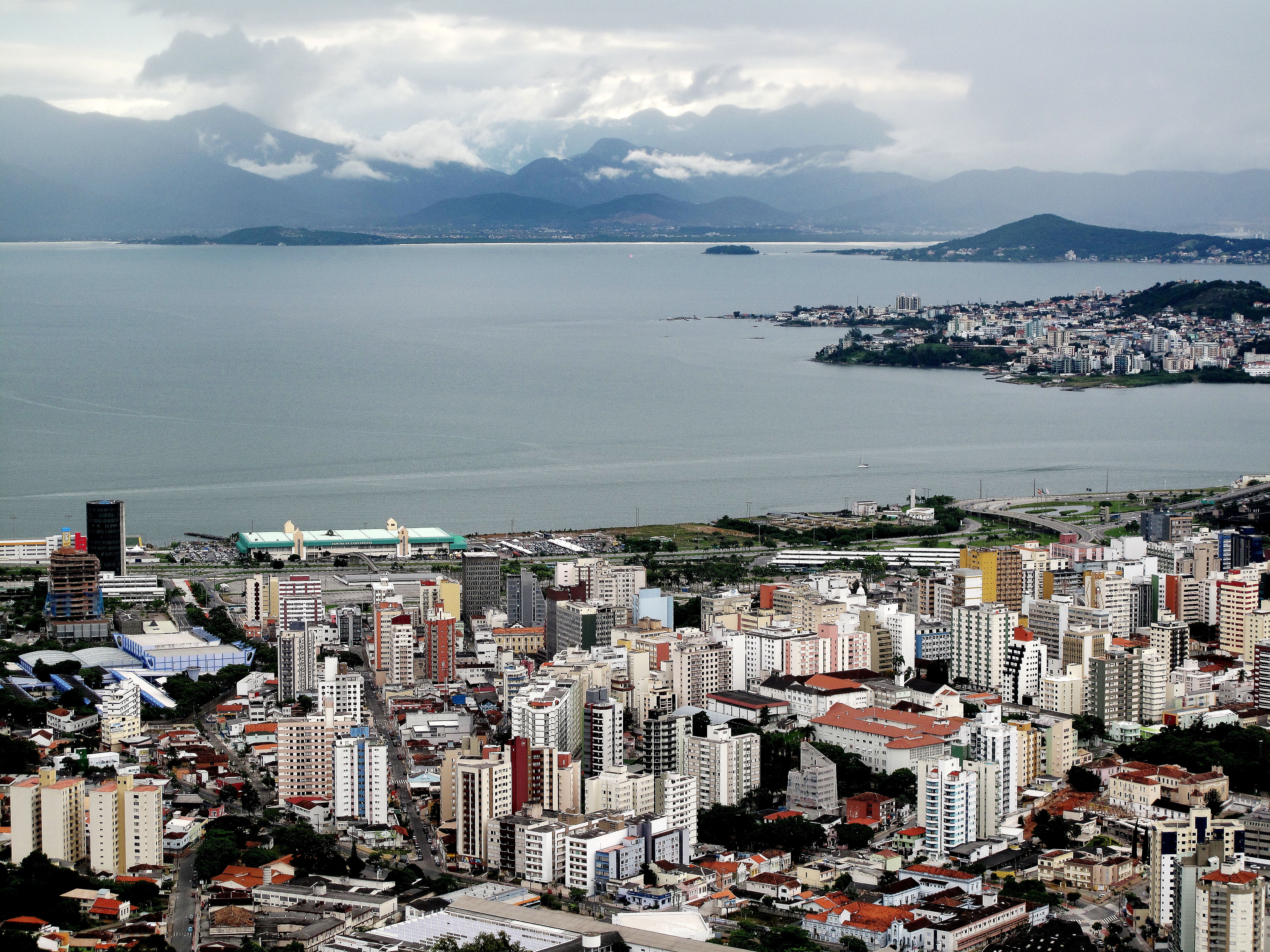 Bahia Norte from Mirante Brazil